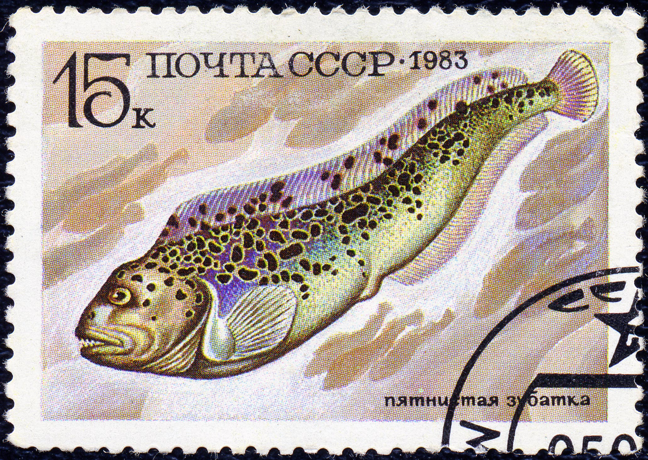 Почтовая марка СССР. 1983. Сибирская зубатка